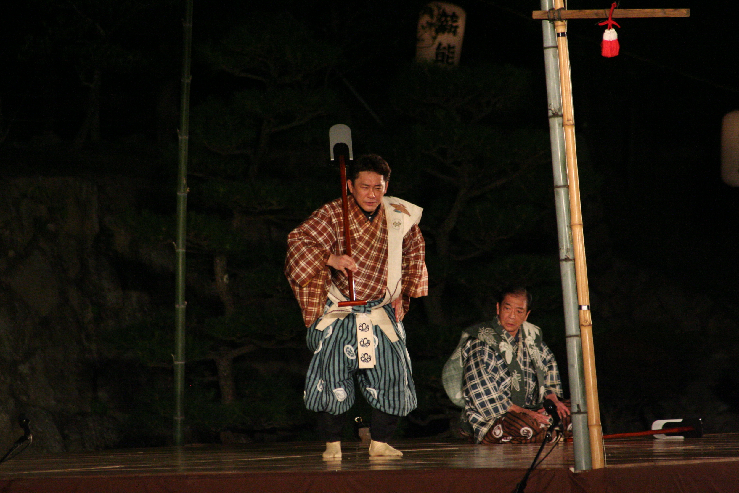 2009年7月31日に姫路城三の丸広場で行なわれた姫路薪能の様子。